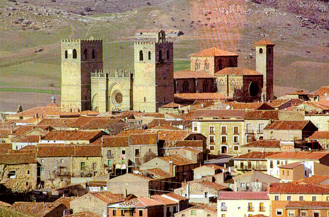 Fachada sur.